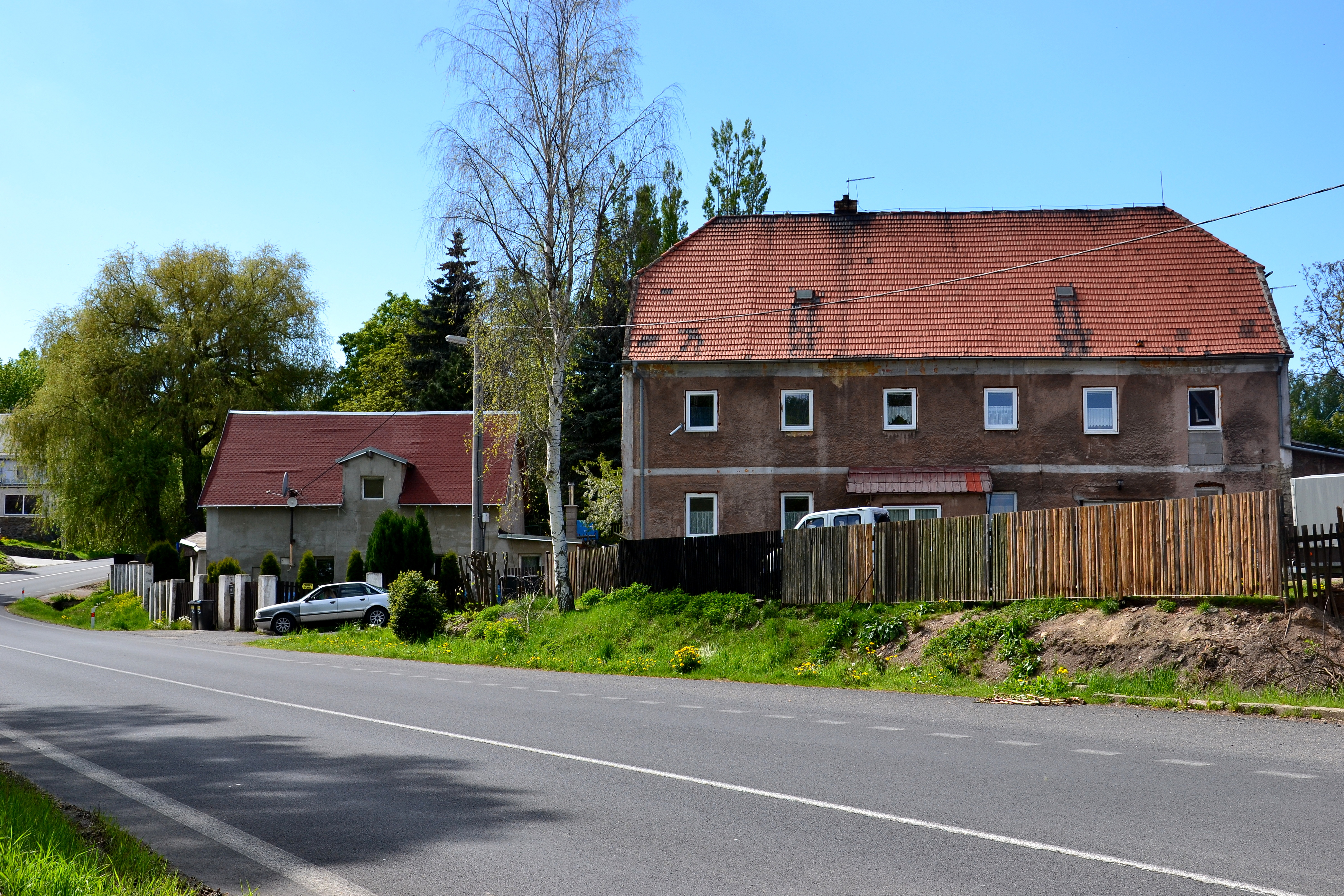 Dům čp. 15